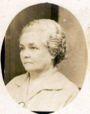 María Montejo Pérez